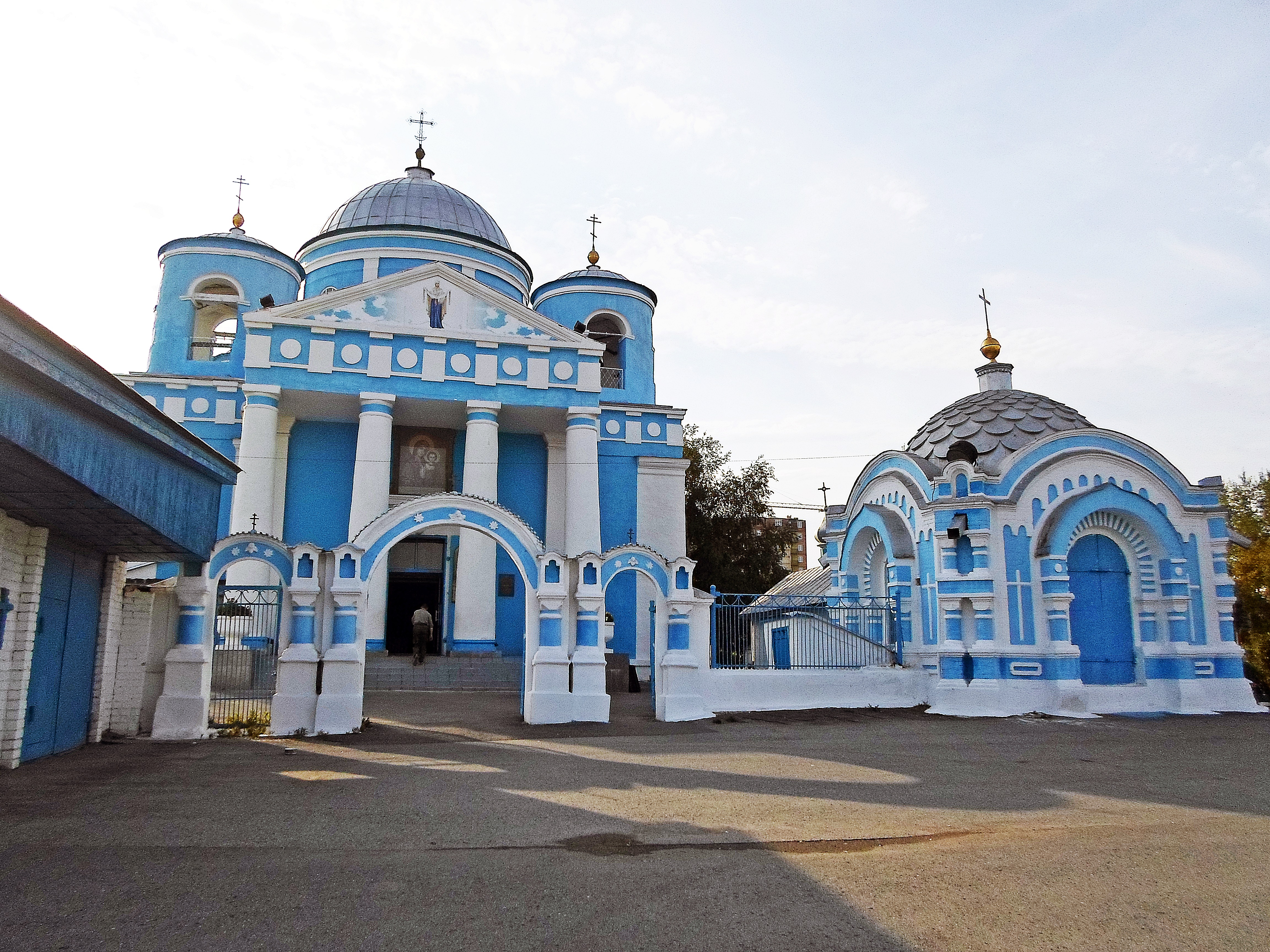 Собор Казанской иконы Божией Матери в Ачинске.